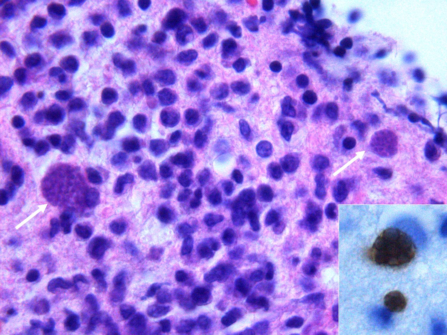 Histologischer und Immunhistochemischer Nachweis von Pseudozysten bei zerebraler Toxoplasmose im Hirnbioptat bei einem immungeschwächtem Patienten.